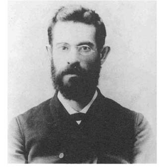 ethnographer Lev (Chaim Leiba) Yakovlevich Sternberg (1861 - 1927)